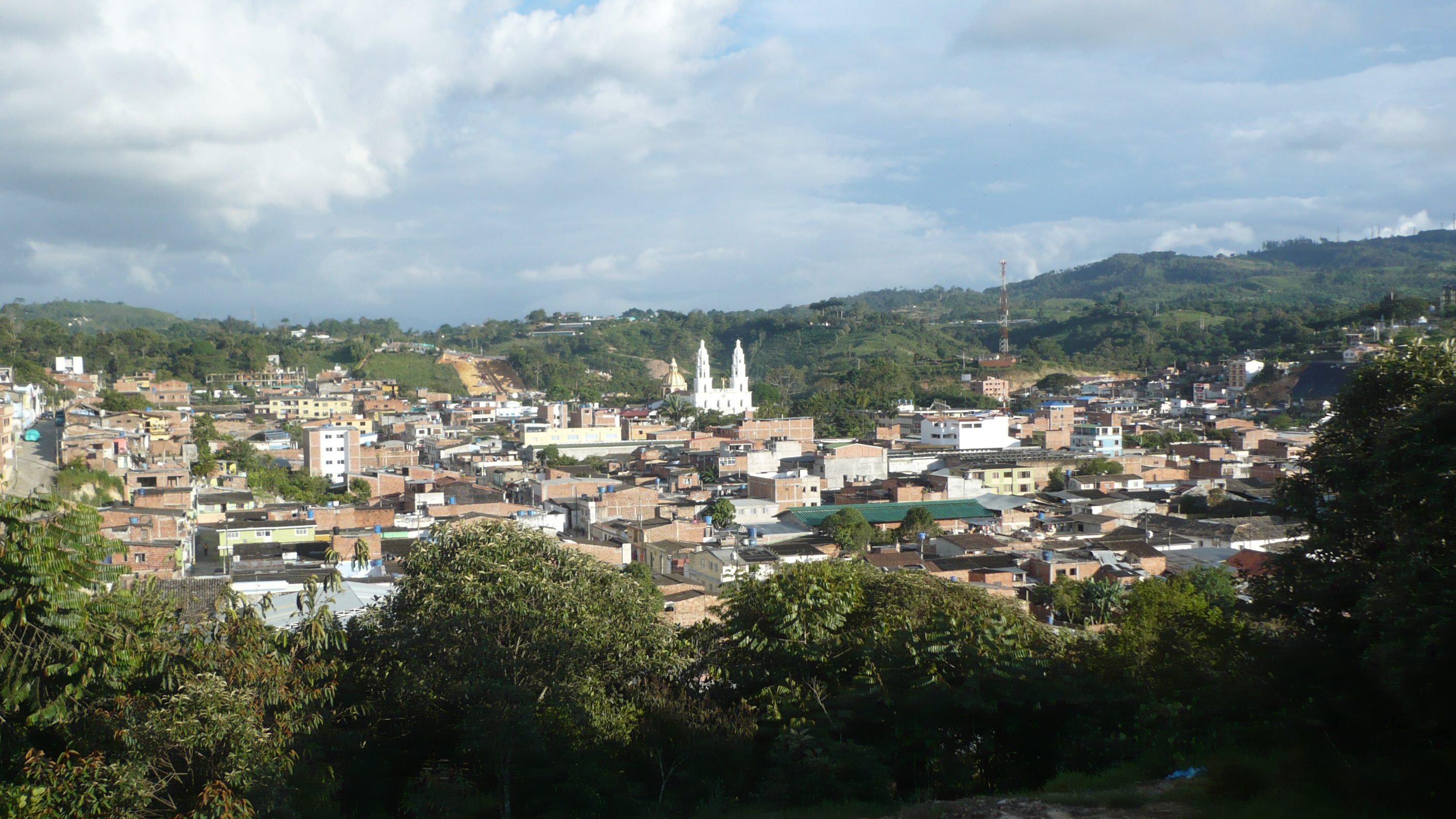 Panorama de Lebrija, dans le departement de Santander, Colombie.